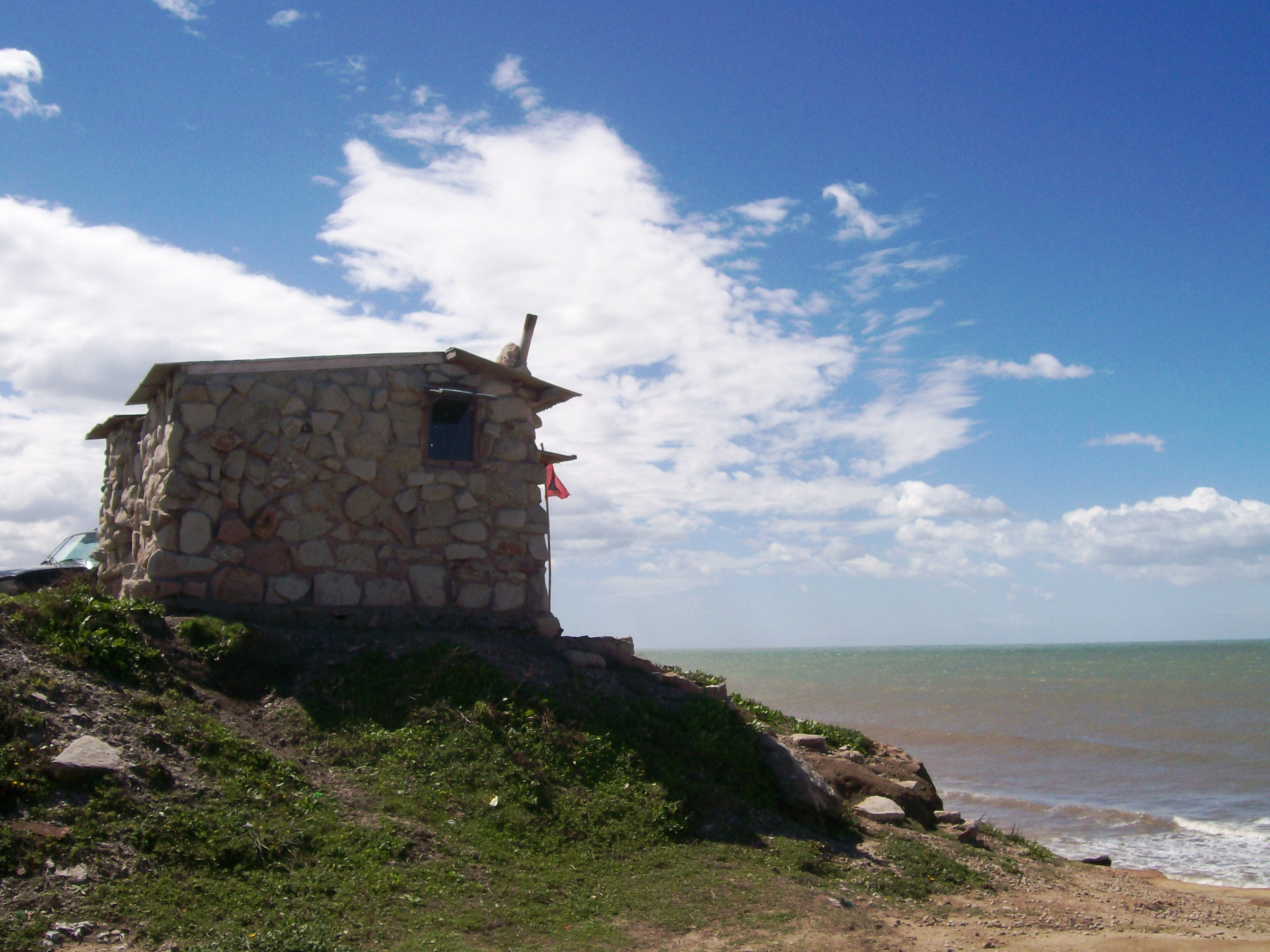 Refugio